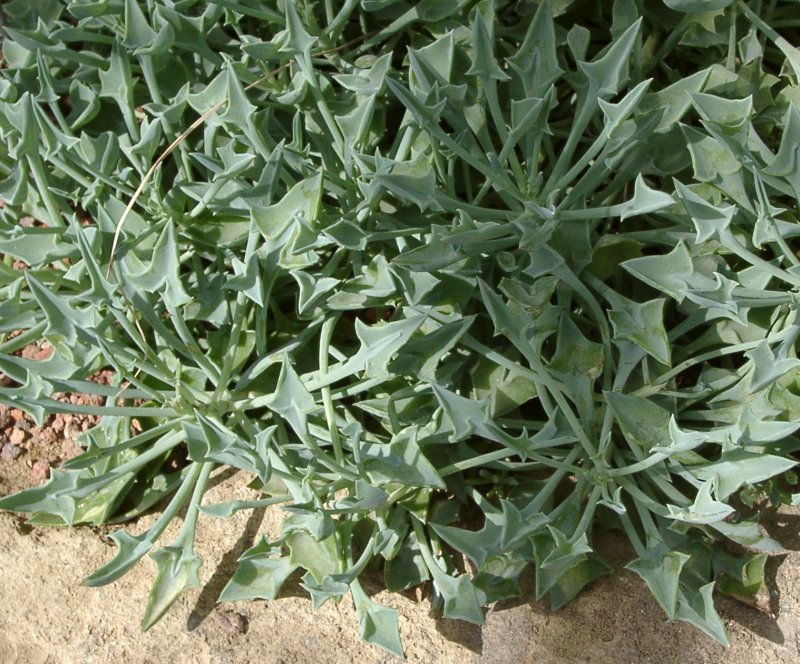 Senecio kleiniaeformis